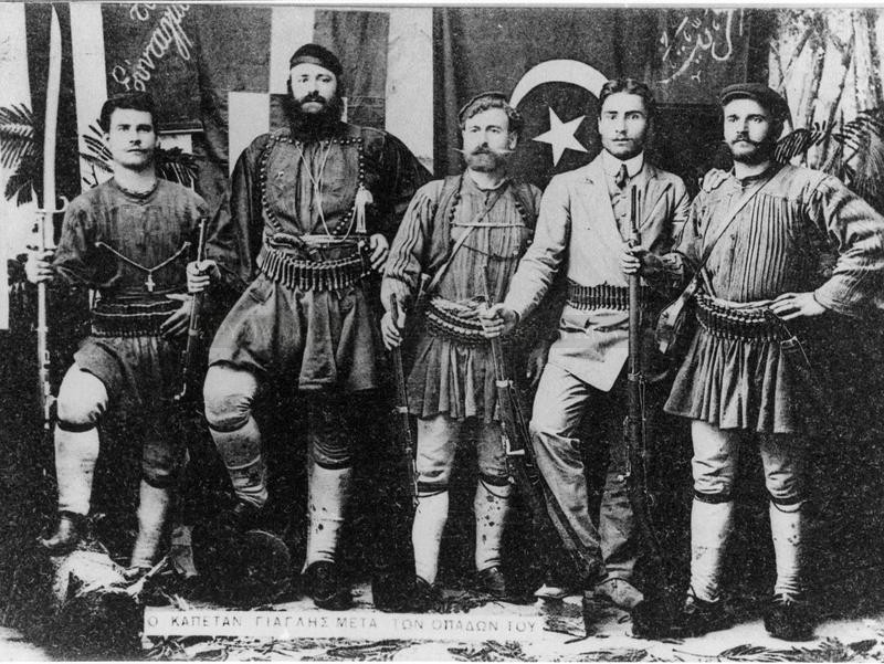 Гръцкият андартски капитан Георгиос Янглис (вторият отляво надясно) заедно с хората си в 1904-1908 година.